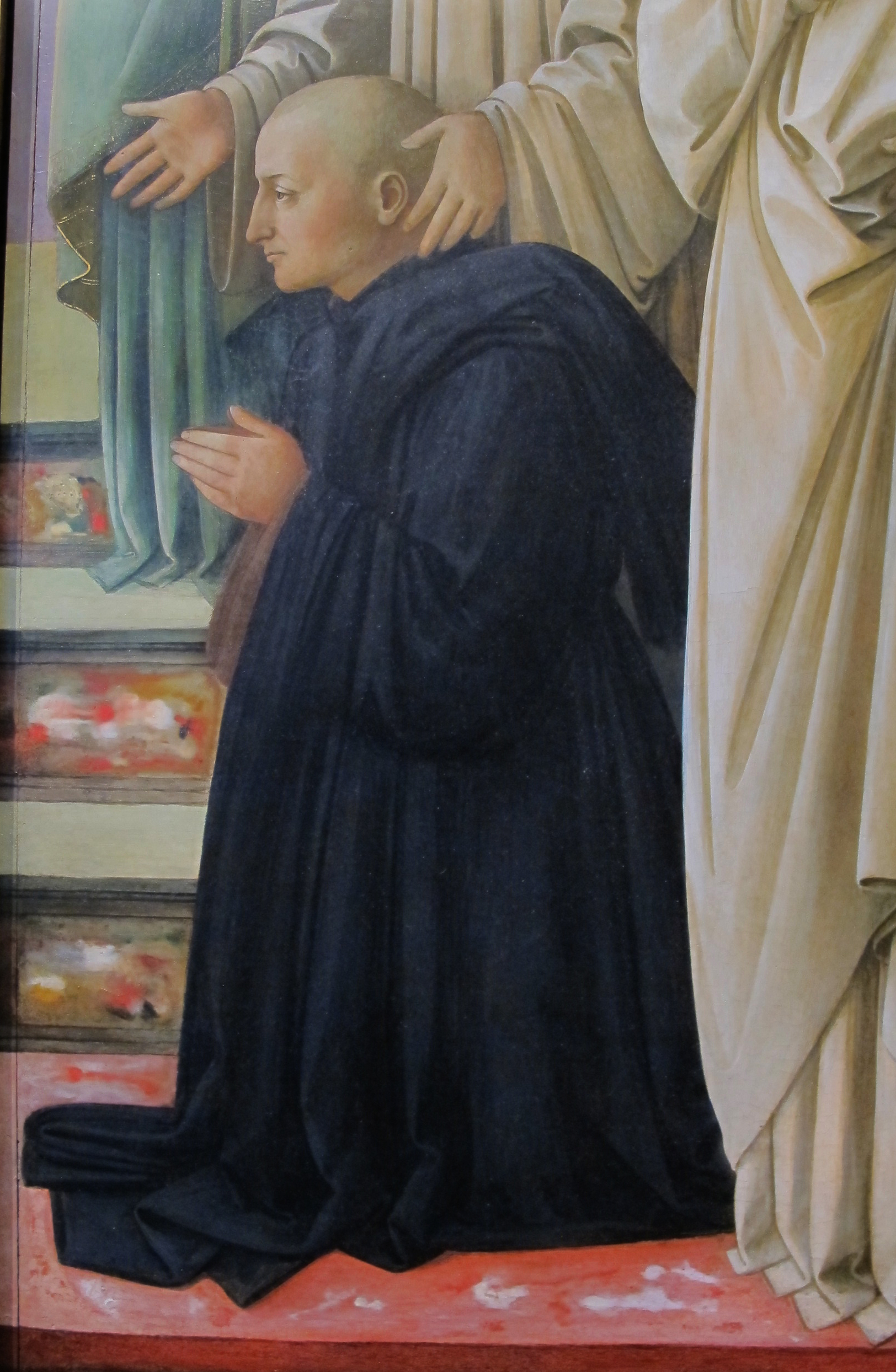 Museo Nazionale d'Arte Medievale e Moderna - MIBAC This is a photo of a monument which is part of cultural heritage of Italy.